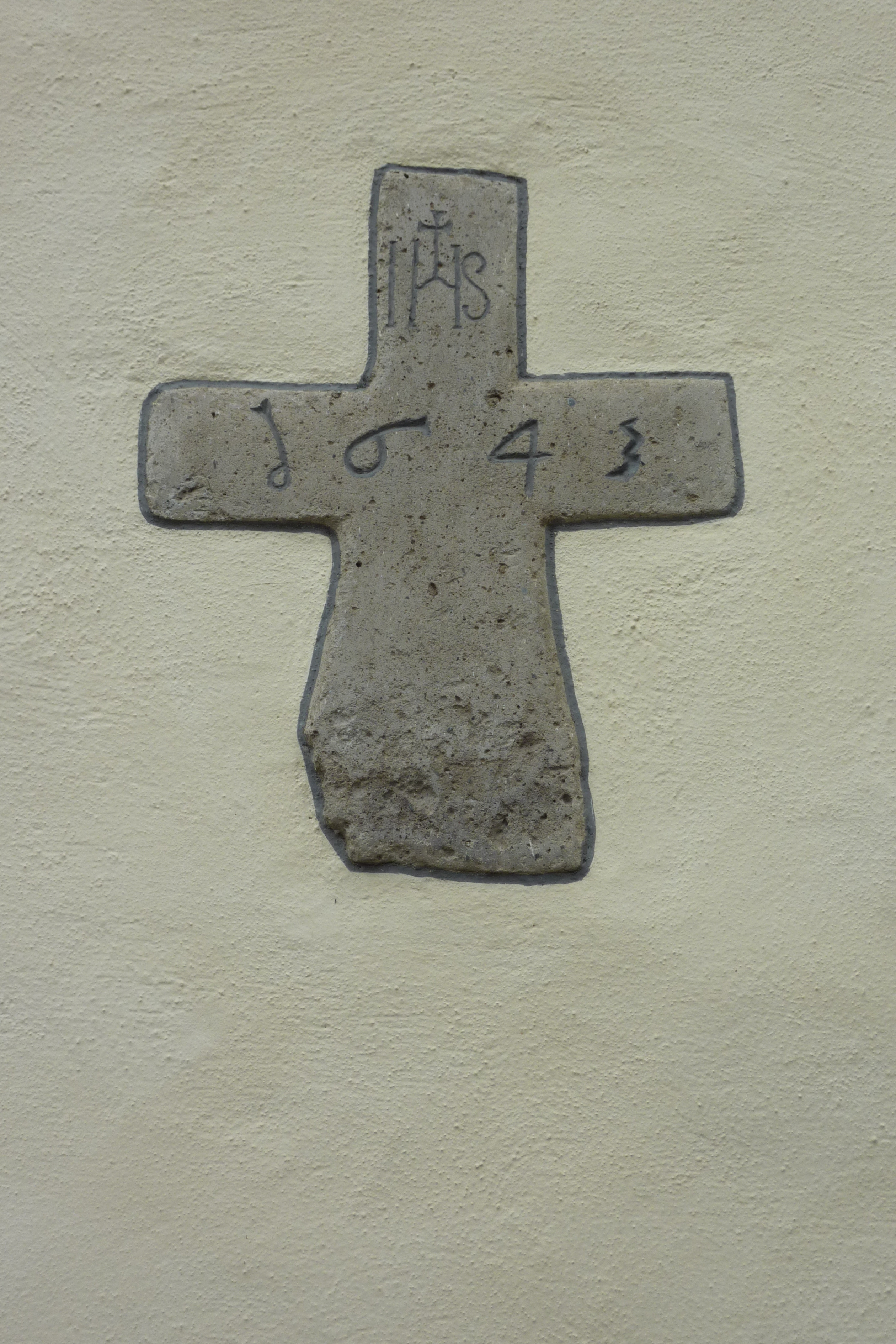 Staffel, katholische Kapelle St. Lüfthildis, Basaltkreuz von 1645